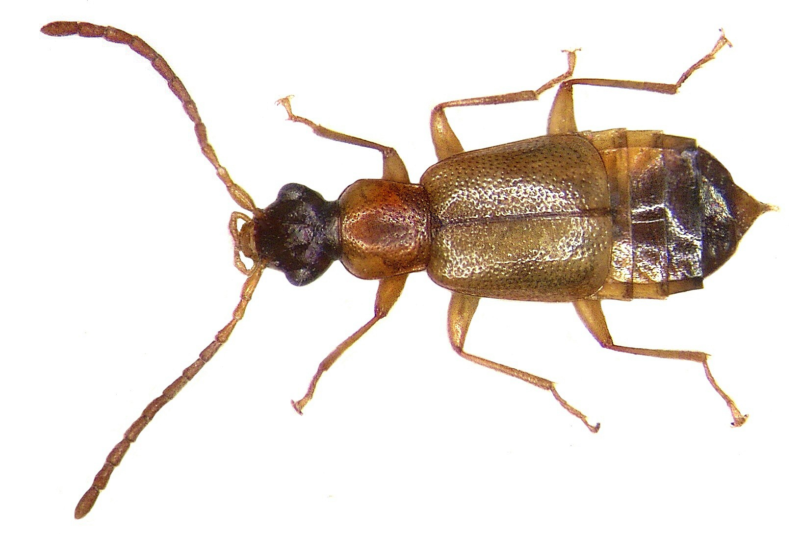 Familie: Staphylinidae Grösse: 4-5 mm Verbreitung: Europa Ökologie: in montanen Gebieten auf Blüten Fundort: Germania, Oberfranken, Selbitz leg. det. U.Schmidt, 2004 Foto: U.Schmidt, 2008